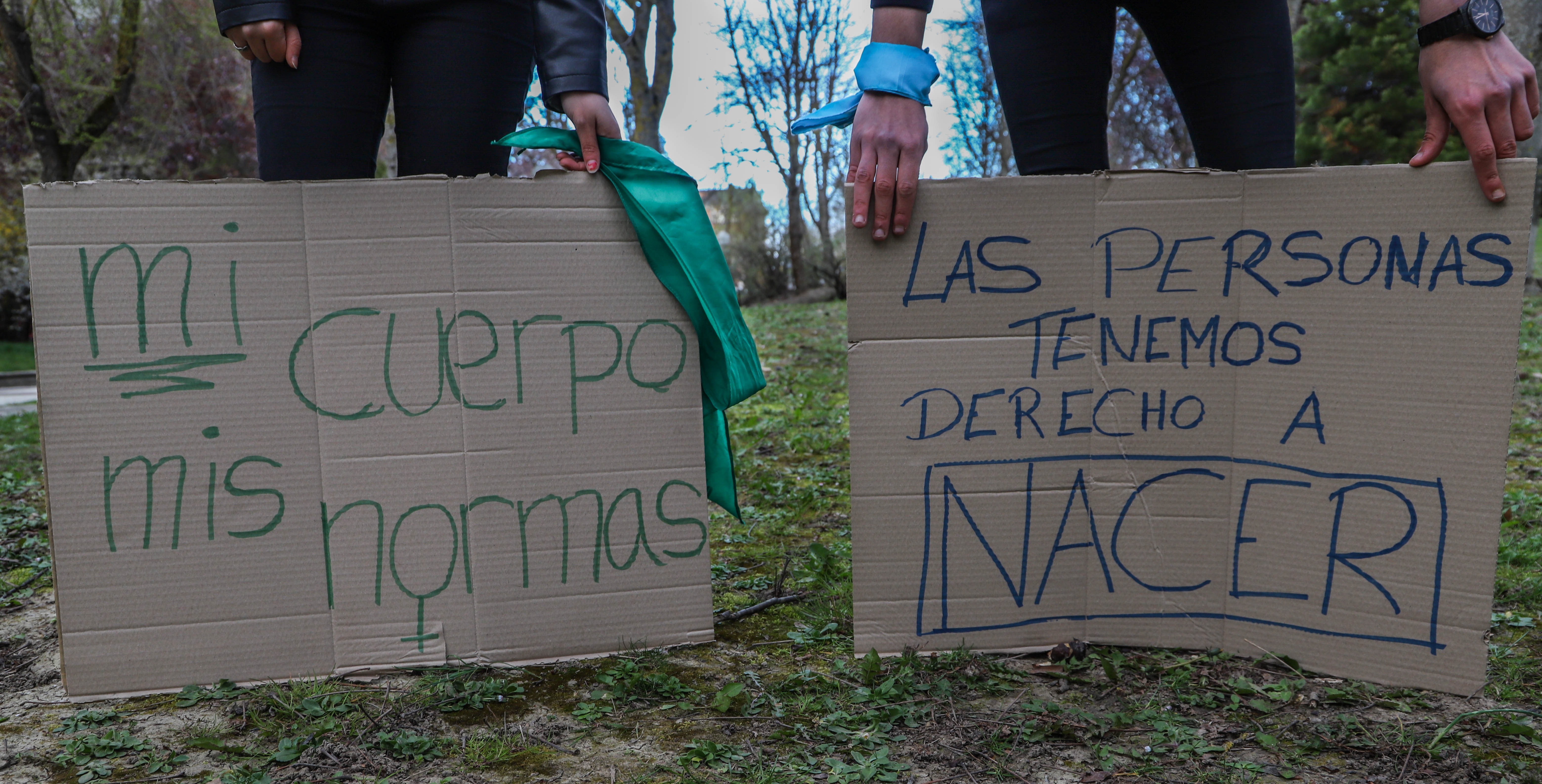 Abortuaren inguruko pentsamendu ugariak